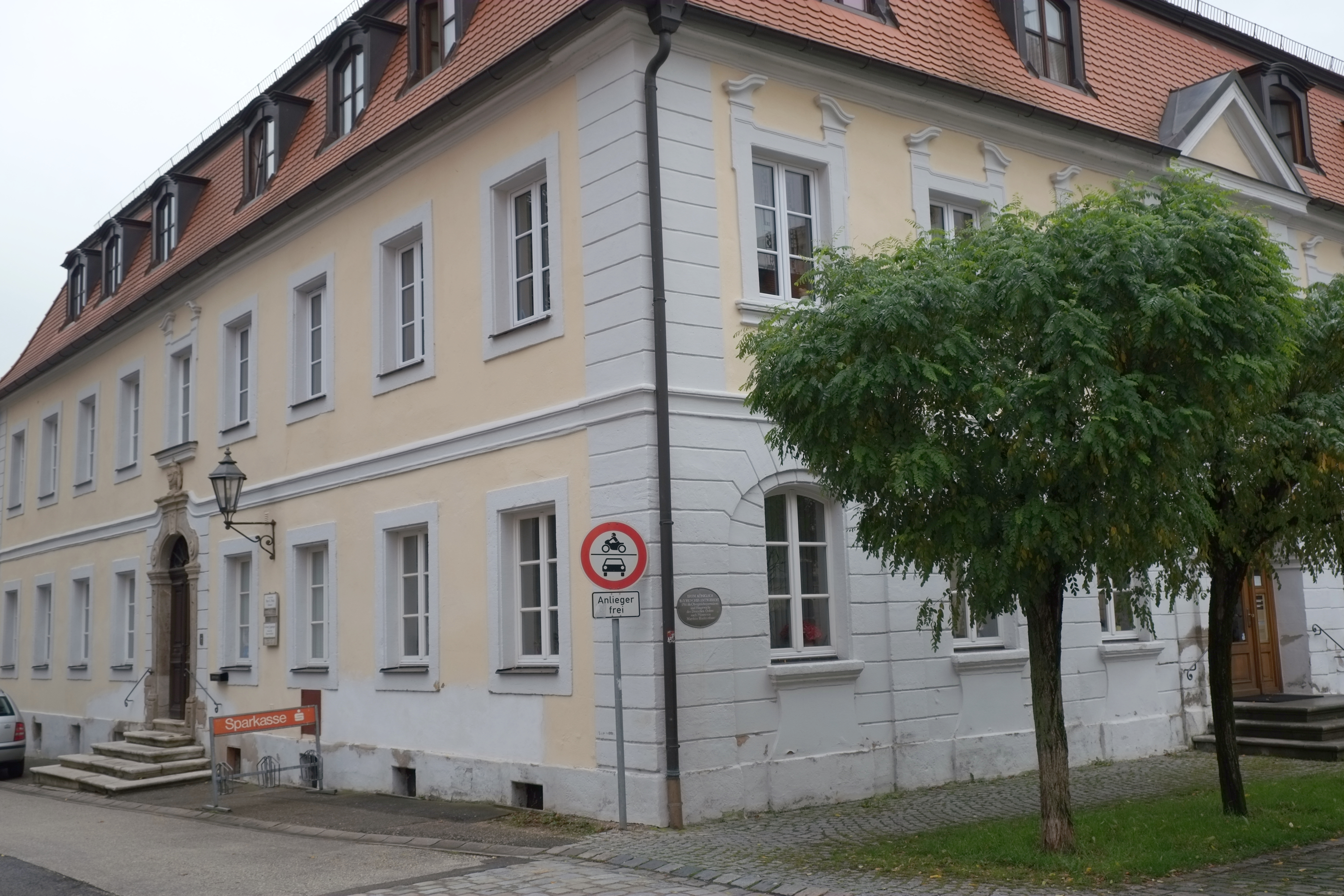 Haus Neue Gasse 1 in Ellingen im Landkreis Weißenburg-Gunzenhausen (Bayern)